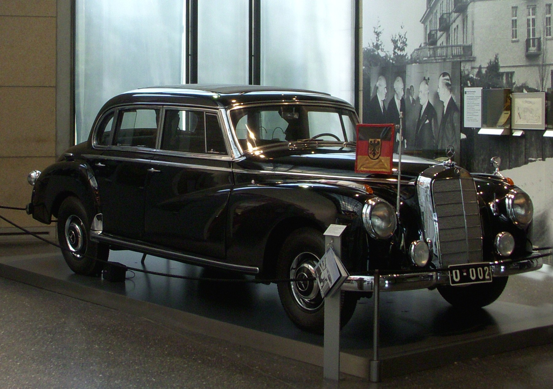 "Haus der Geschichte" in Bonn, Konrad Adenauers Dienst-Mercedes